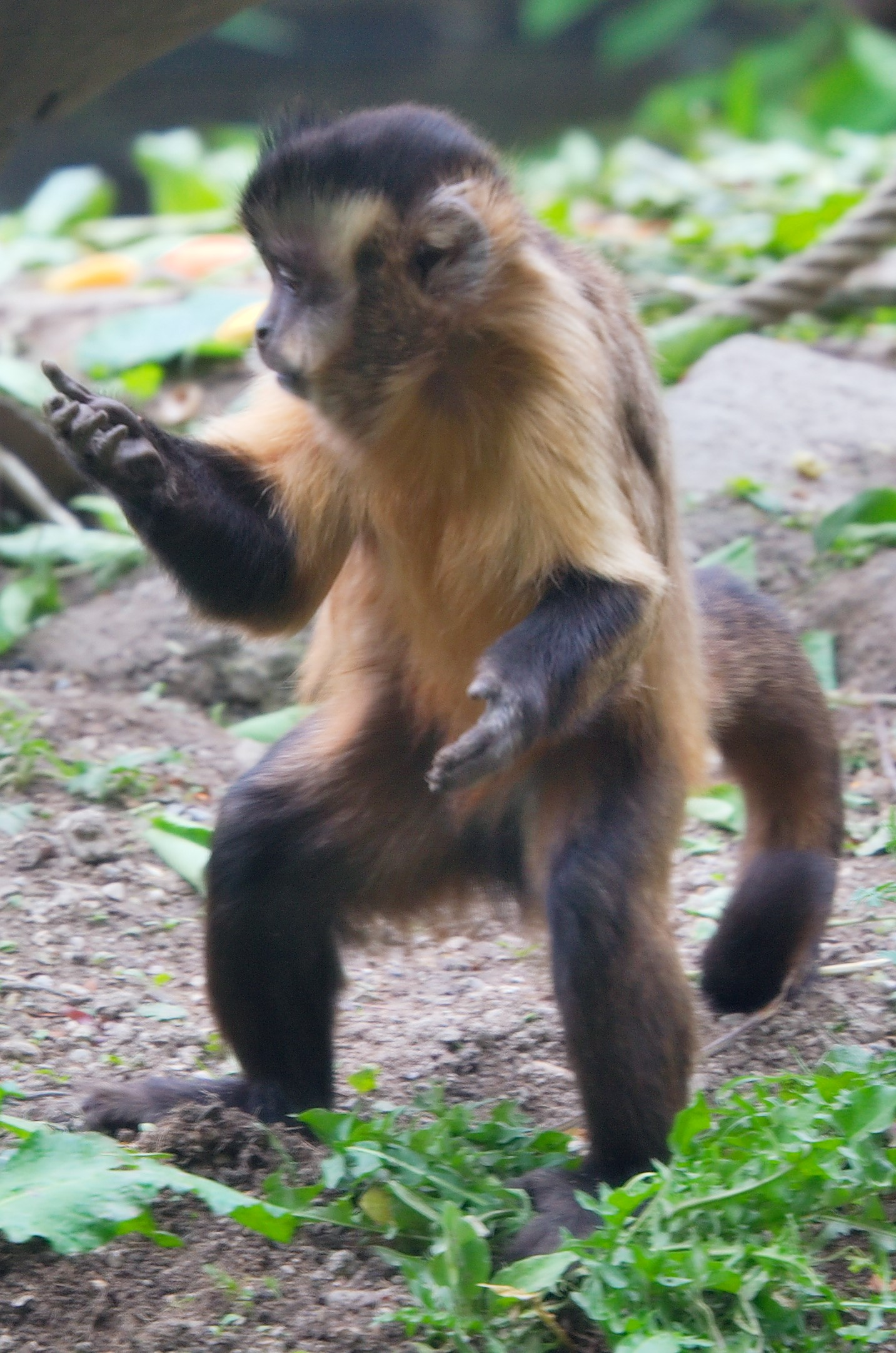 Gehaupter Kapuzineraffe Cebus apella